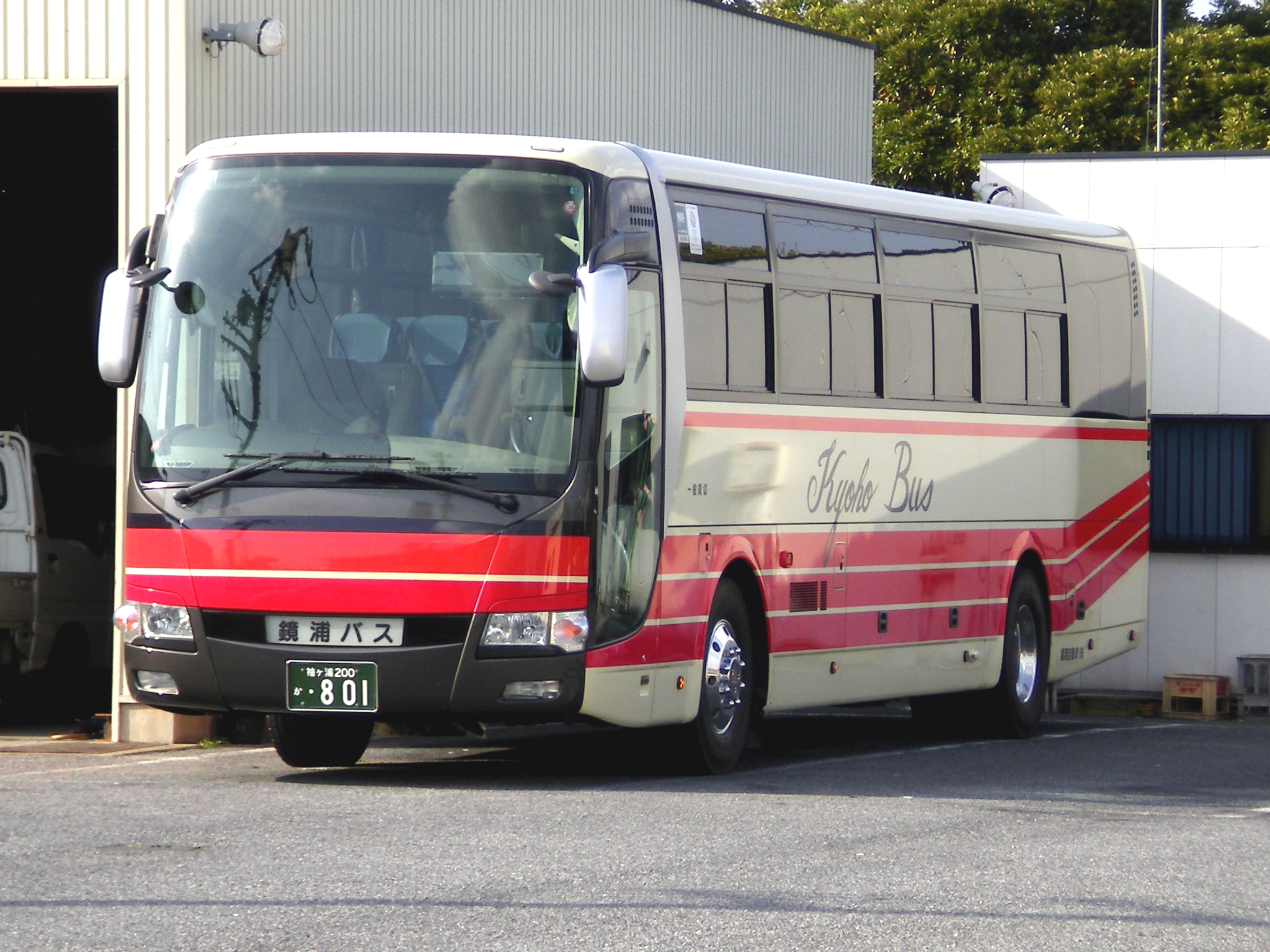 三菱ふそう・エアロエース 袖ケ浦200か801 鏡浦自動車館山営業所敷地外から撮影